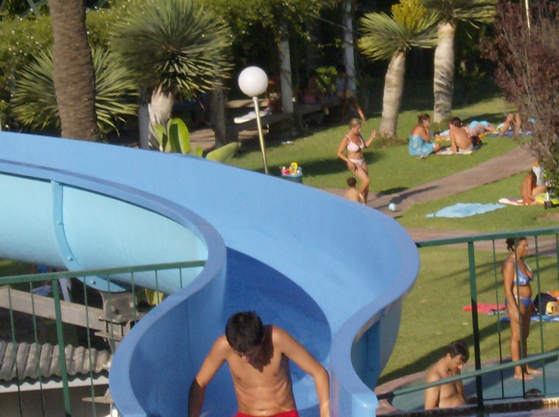 Tobogán de agua